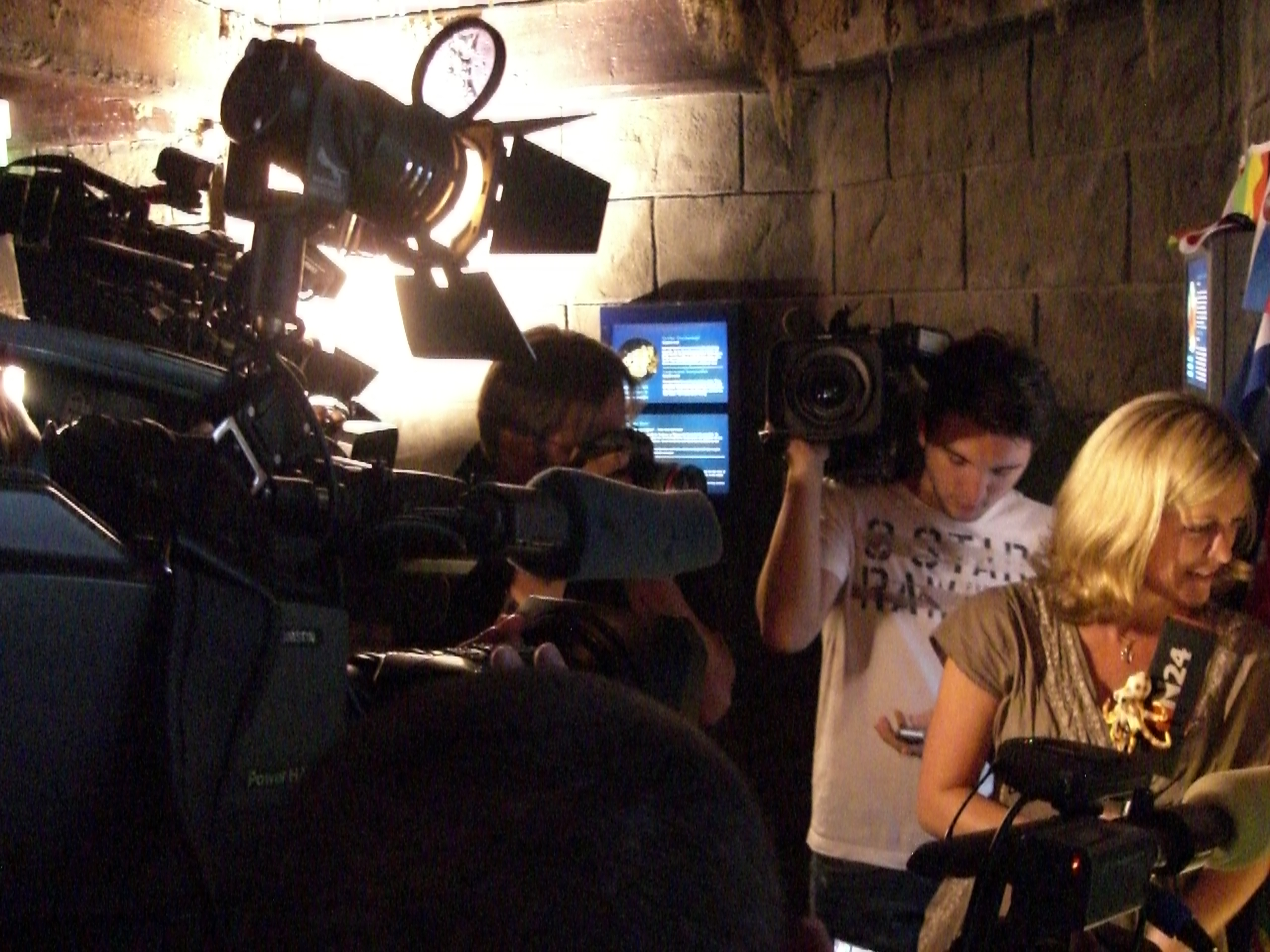 Presse beim Oktopus-Orakel Paul.